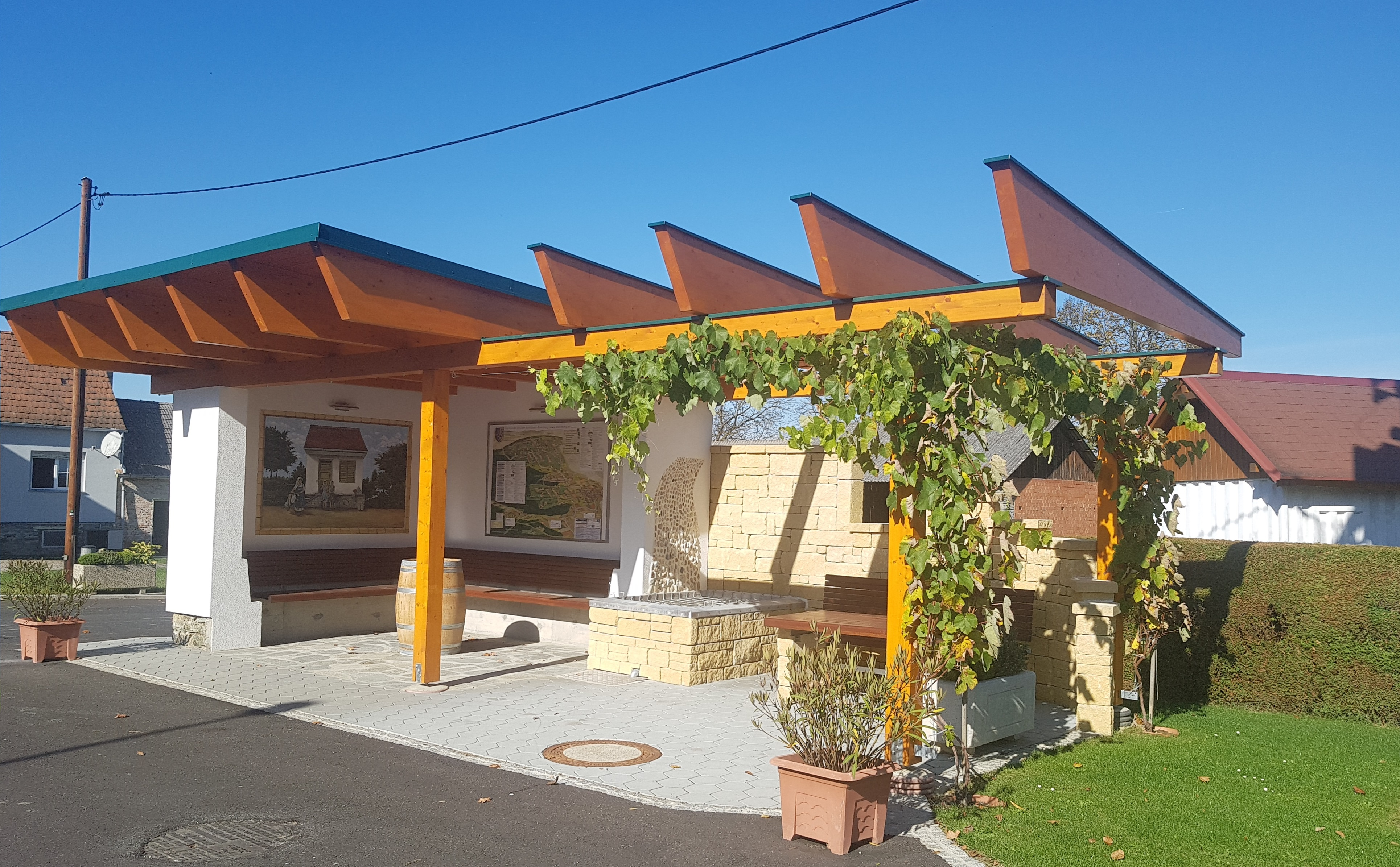 Die im Jahr 2018 vom Ortsverschönerungsverein neu errichtete Bushaltestelle